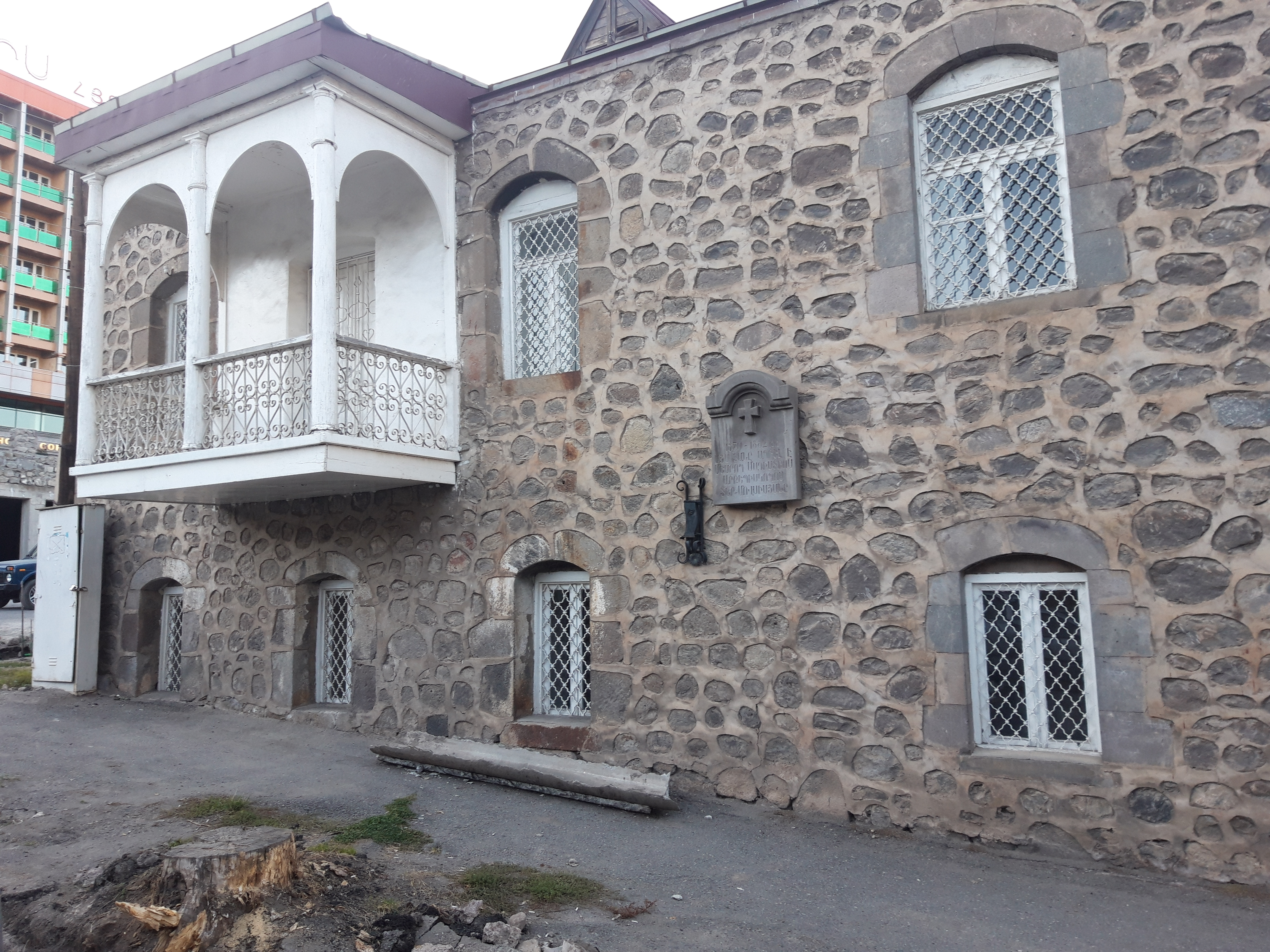 Բնակելի տուն Գորիսում, այս տանը 1870-1882 թվականներին ապրել է Մեսրոպ Մագիստրոս արք․Տեր-Մովսիսյանը